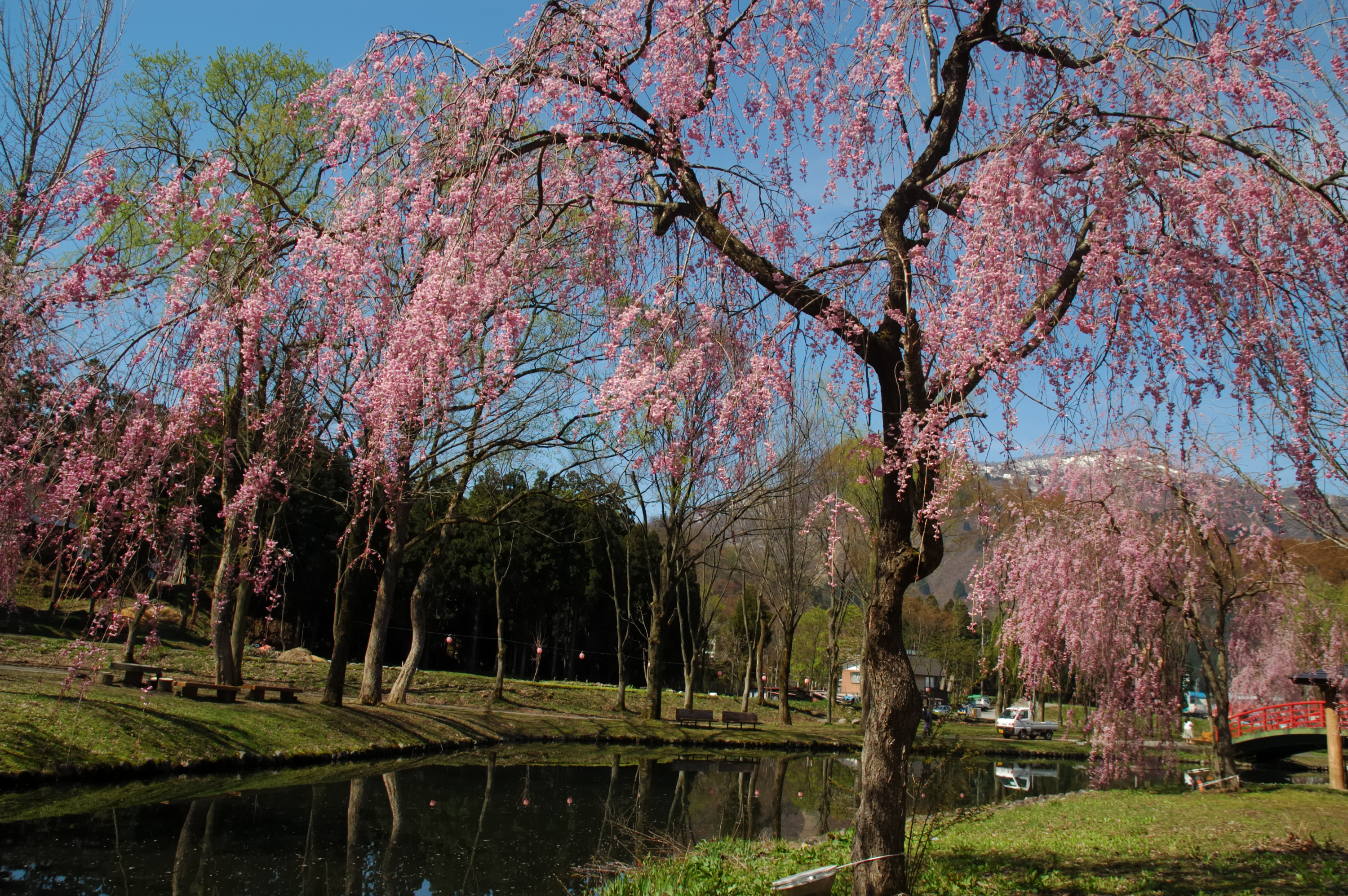 Sakura of Yuzawa Chuo Park (湯沢中央公園のサクラ)